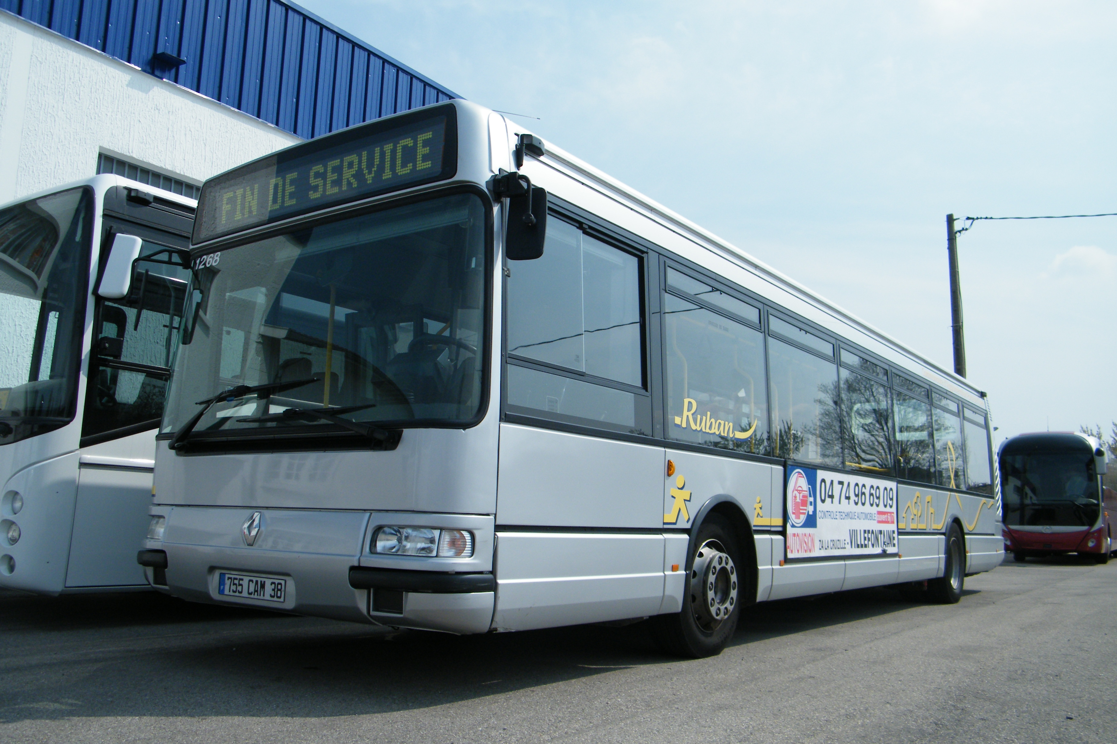 Irisbus Agora Line n°1265 du réseau Ruban